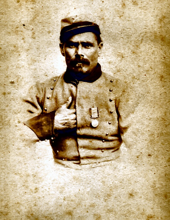 Feliciano Novelli (1833-1918) fu uno dei componenti della spedizione dei Mille.